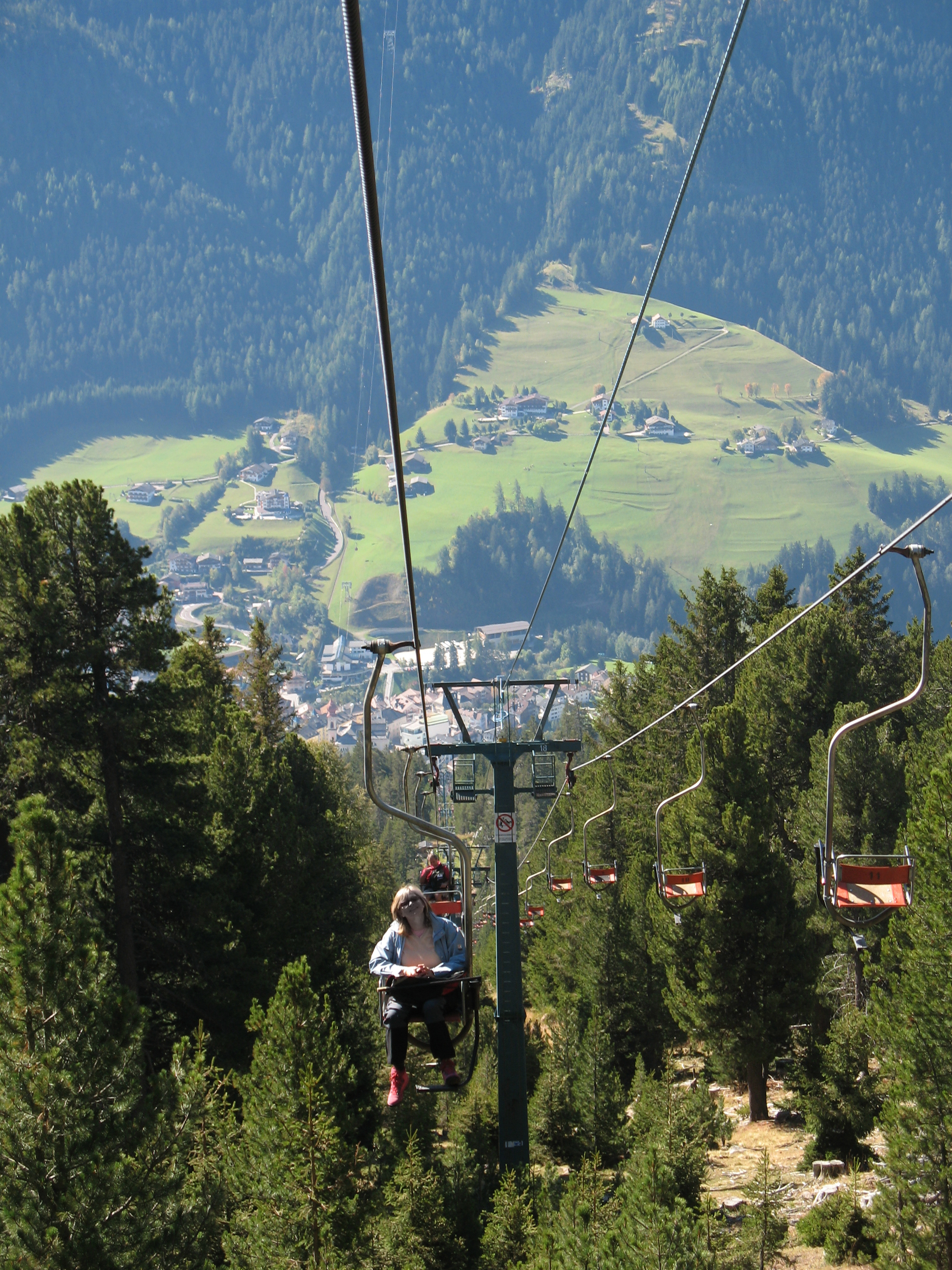 Der Sessellift von Raschötz über St. Ulrich in Gröden